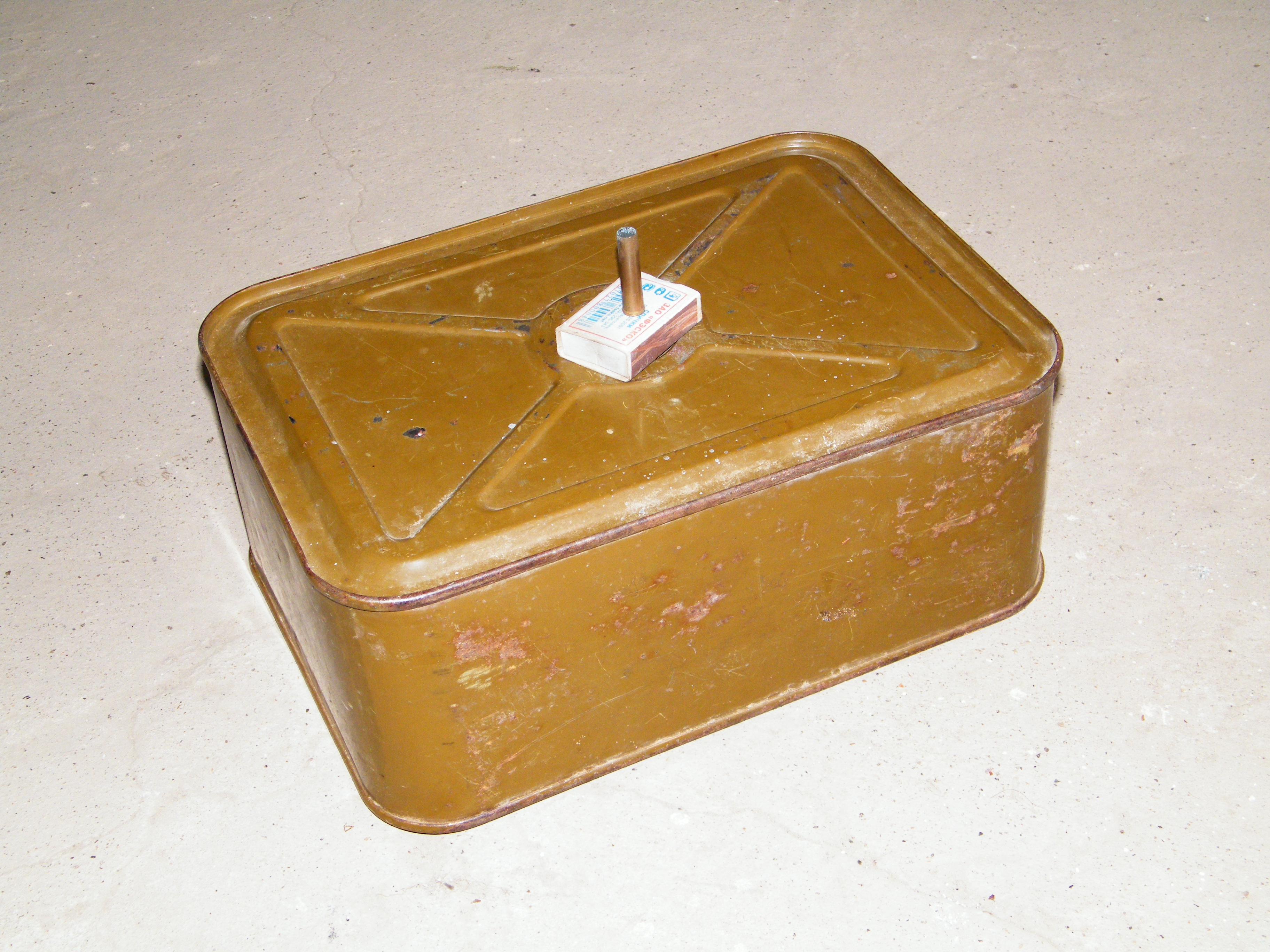 Патронный цинк - герметично закрытая в заводских условиях металлическая коробка в которой на военном складе хранятся патроны к стрелковому оружию.